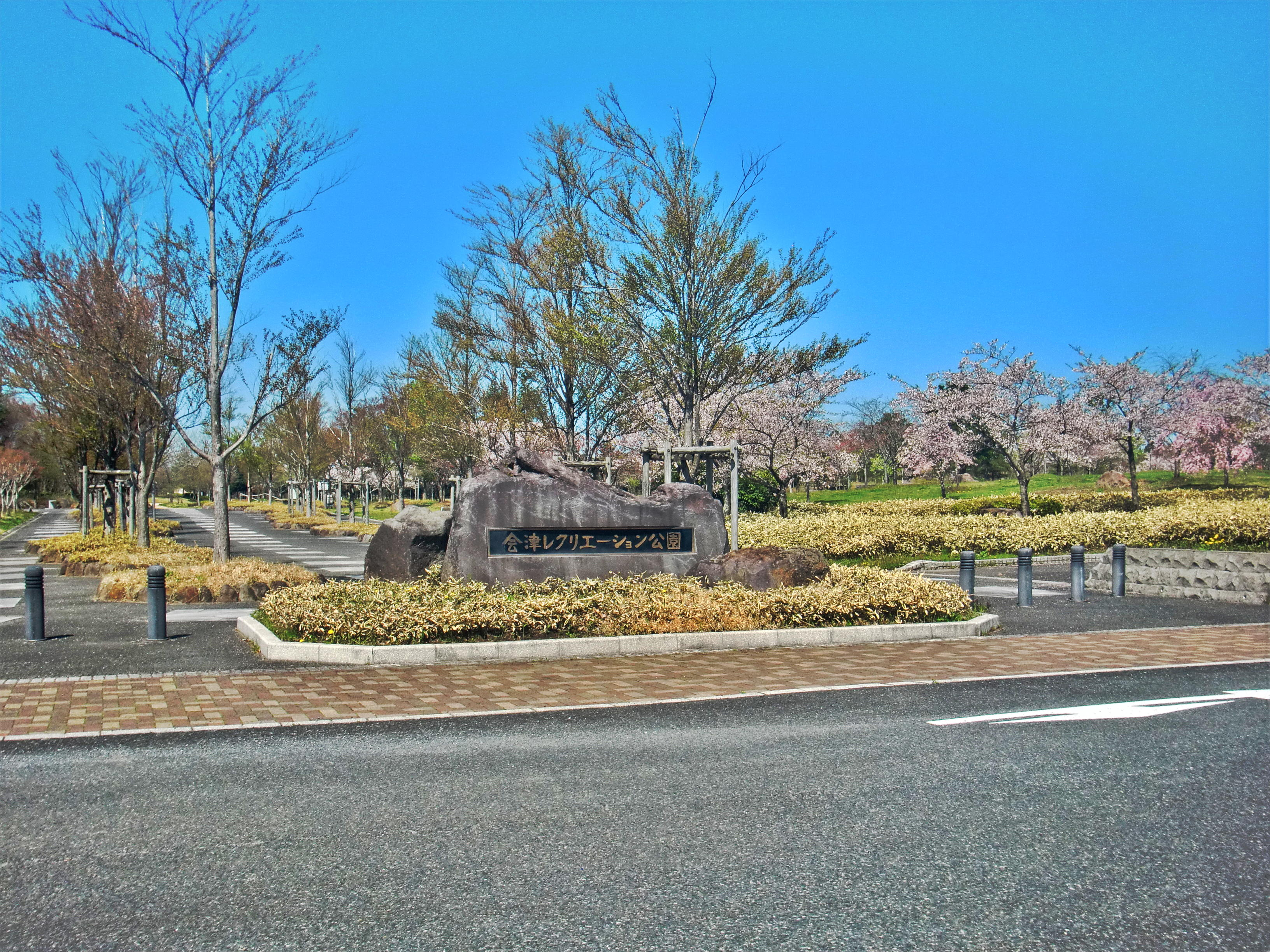 会津レクリエーション公園 入口